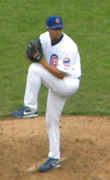 Ángel Guzmán